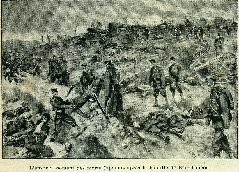 see picture